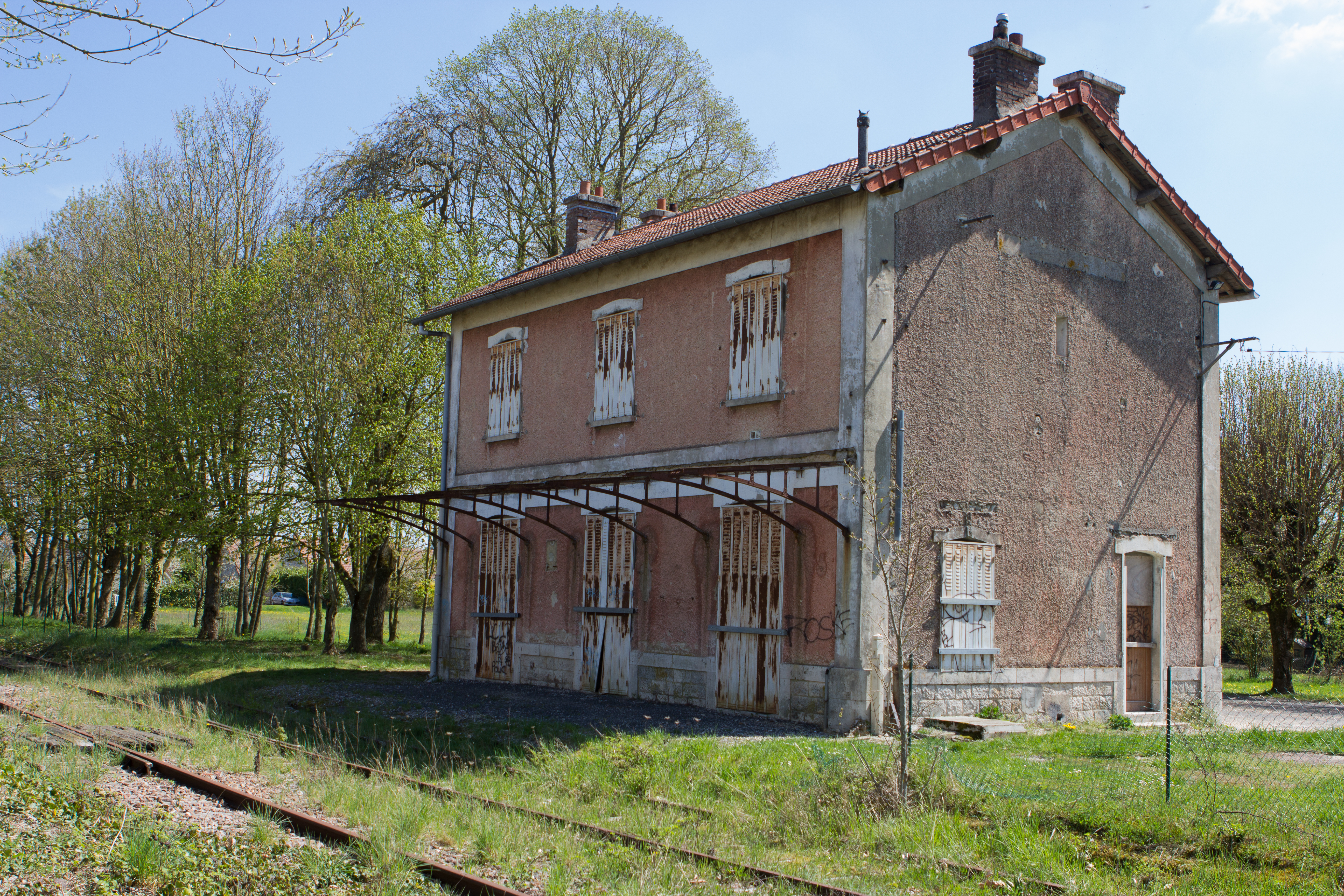 Ligne de Bourron-Marlotte à Malesherbes / gare de La Chapelle-la-Reine / Vue de l'ancien bâtiment voyageurs / Commune de La Chapelle-la-Reine, Seine-et-Marne